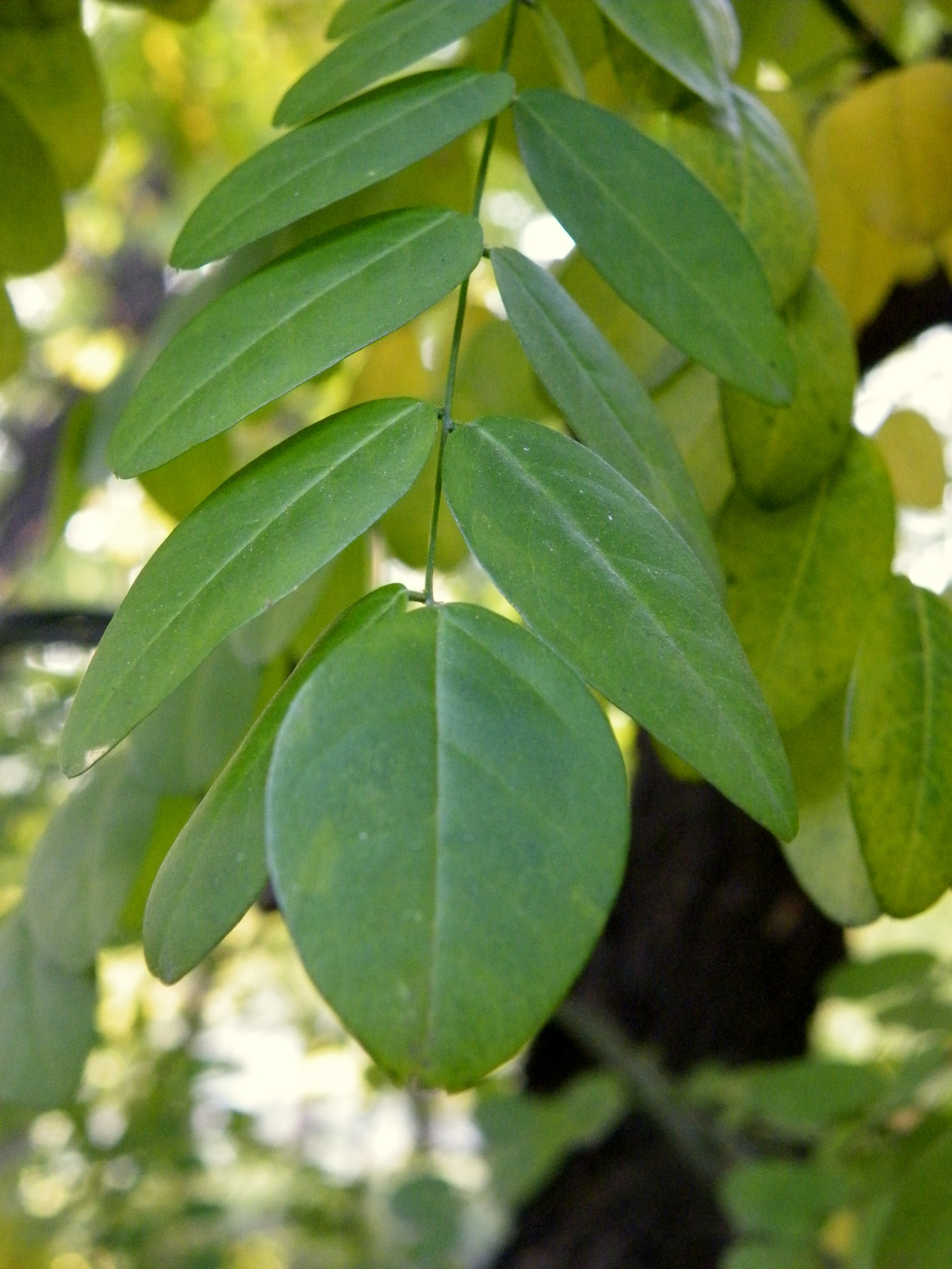 Српски (ћирилица): Sophora japonica var. pendula (софора) је листопадно дрво, високо до 30 метара са округлом крошњом. Sophora japonica var. pendula је варијетет врсте Sophora japonica и има висеће гране. This media file is produced by Wikipedian in Residence in Botanical Garden Jevremovac in 2015.